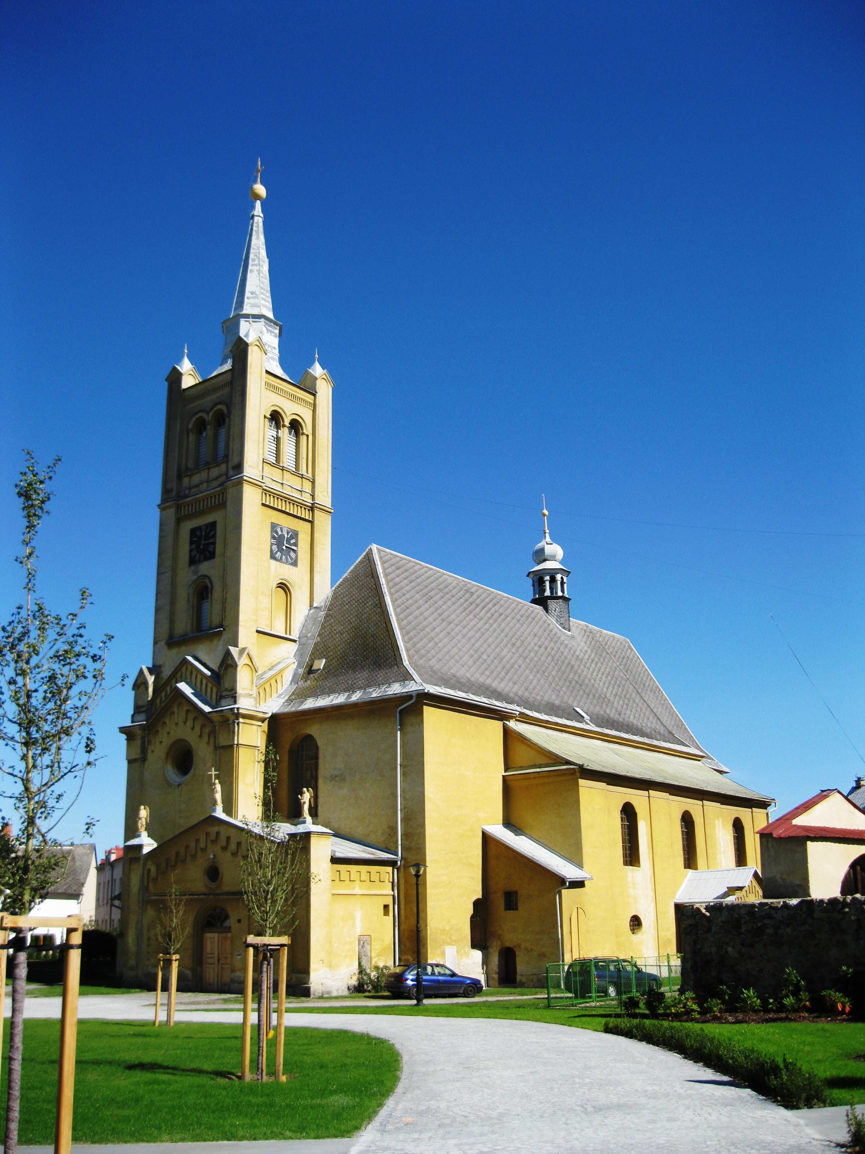 Kostel sv. Kateřiny (Vidnava), Kostelní, Vidnava